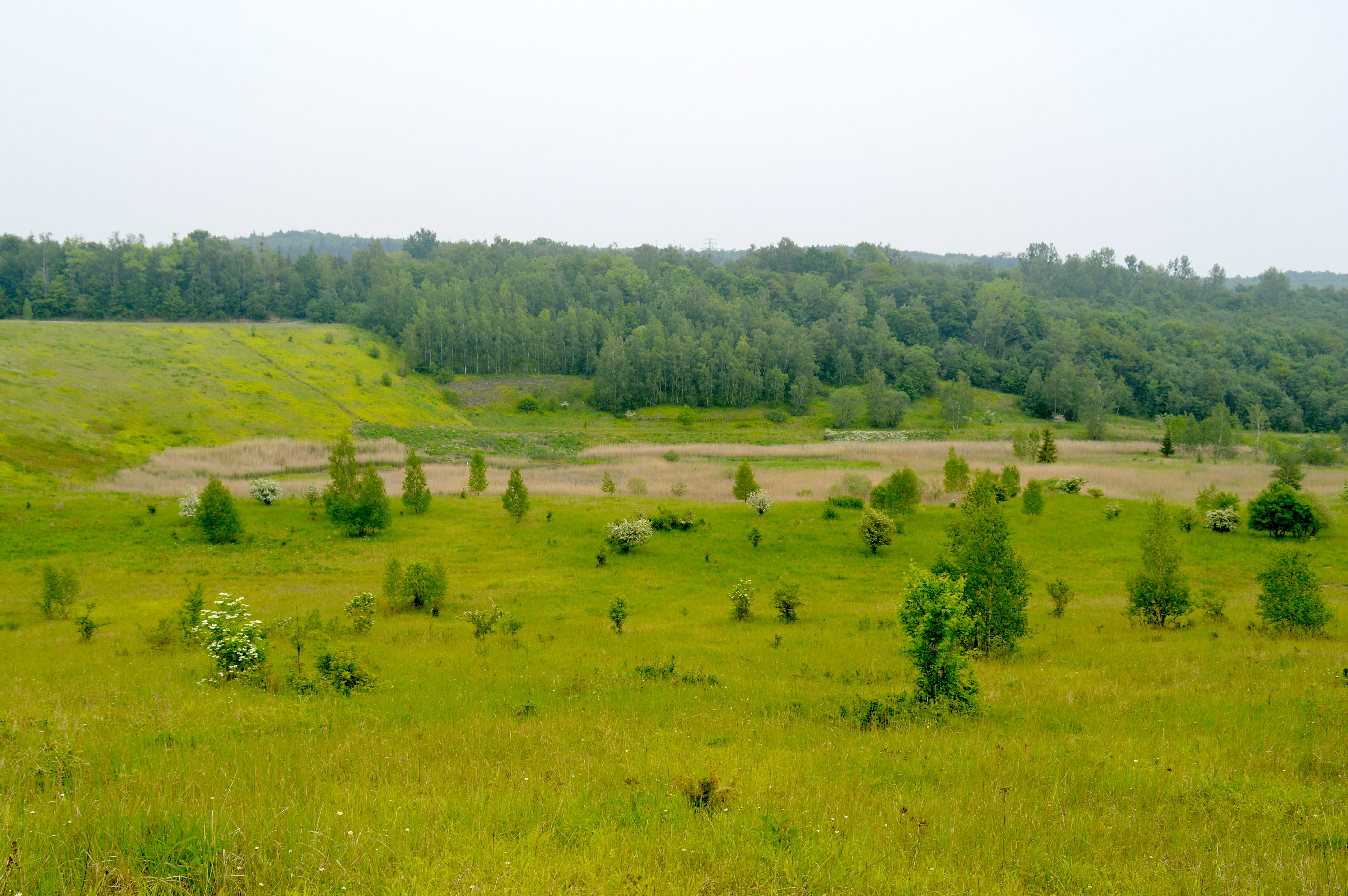 FFH Kammmolch-Biotop Tagebau Haverlahwiese (2)